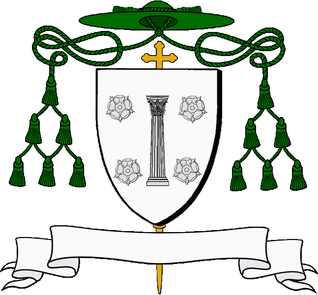 dougen a ra ur golonenn heuliet gant ur rozenn ouzh pep konk